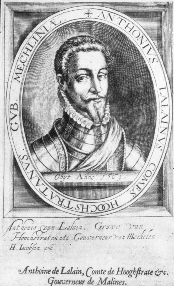 Antoine II de Lalaing (c. 1535-1568)